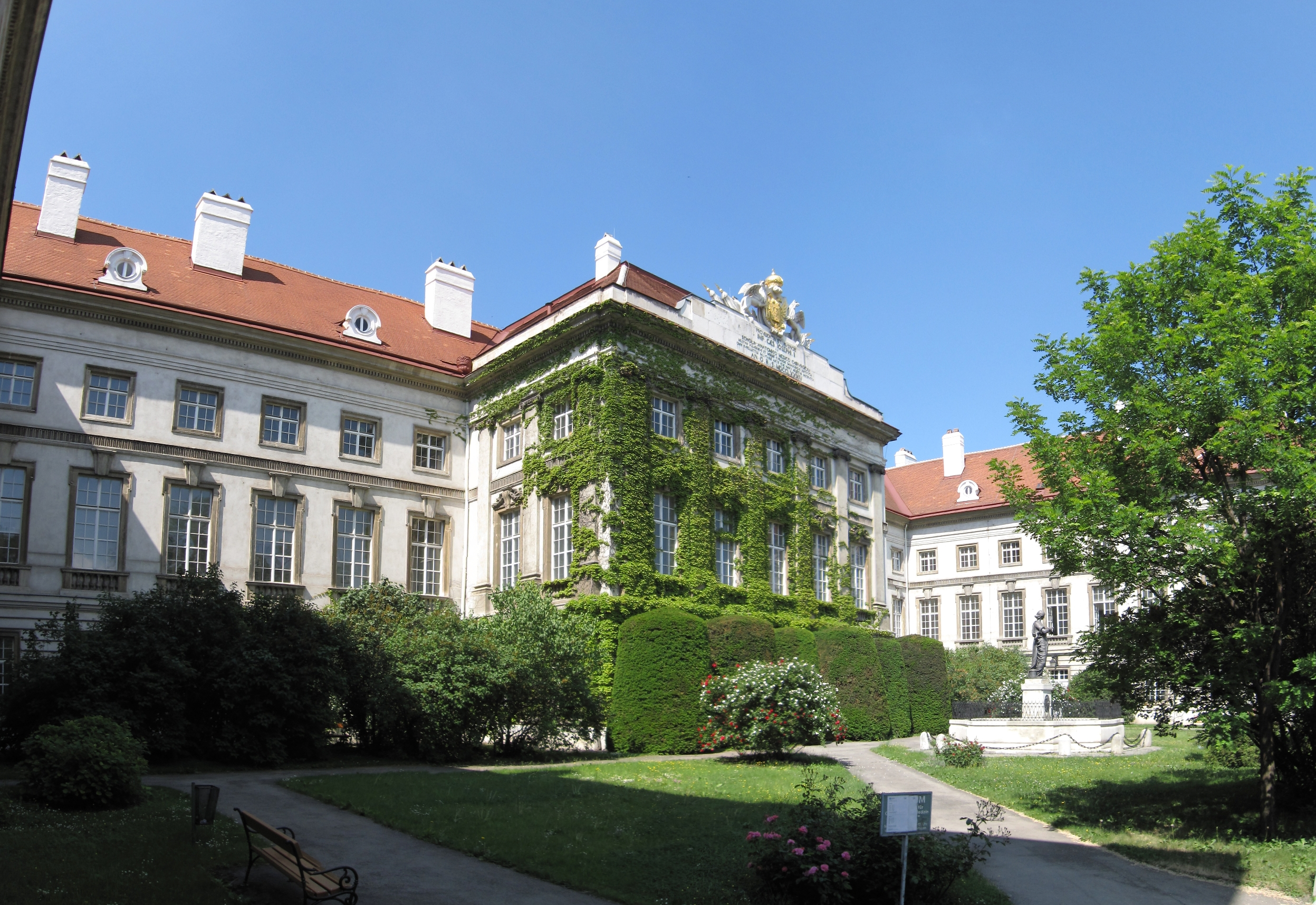 Josephinum in Vienna.